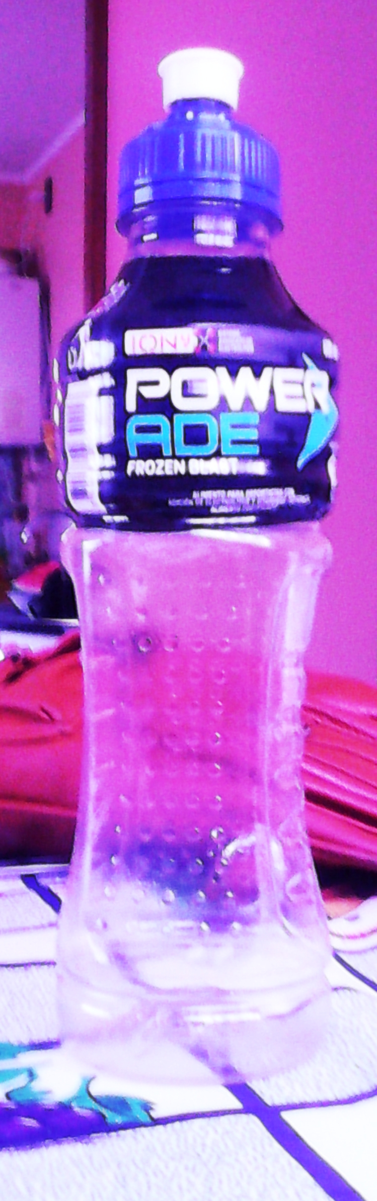 Envase vacío de bebida Powerade, sabor frozen blast, de seiscientos mililitros, fabricado y vendido en Chile.